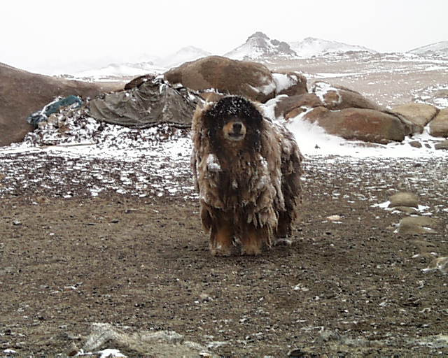 Здесь показано, что у собаки пух уже отошел от кожи. но держится на кончиках новой шерсти.